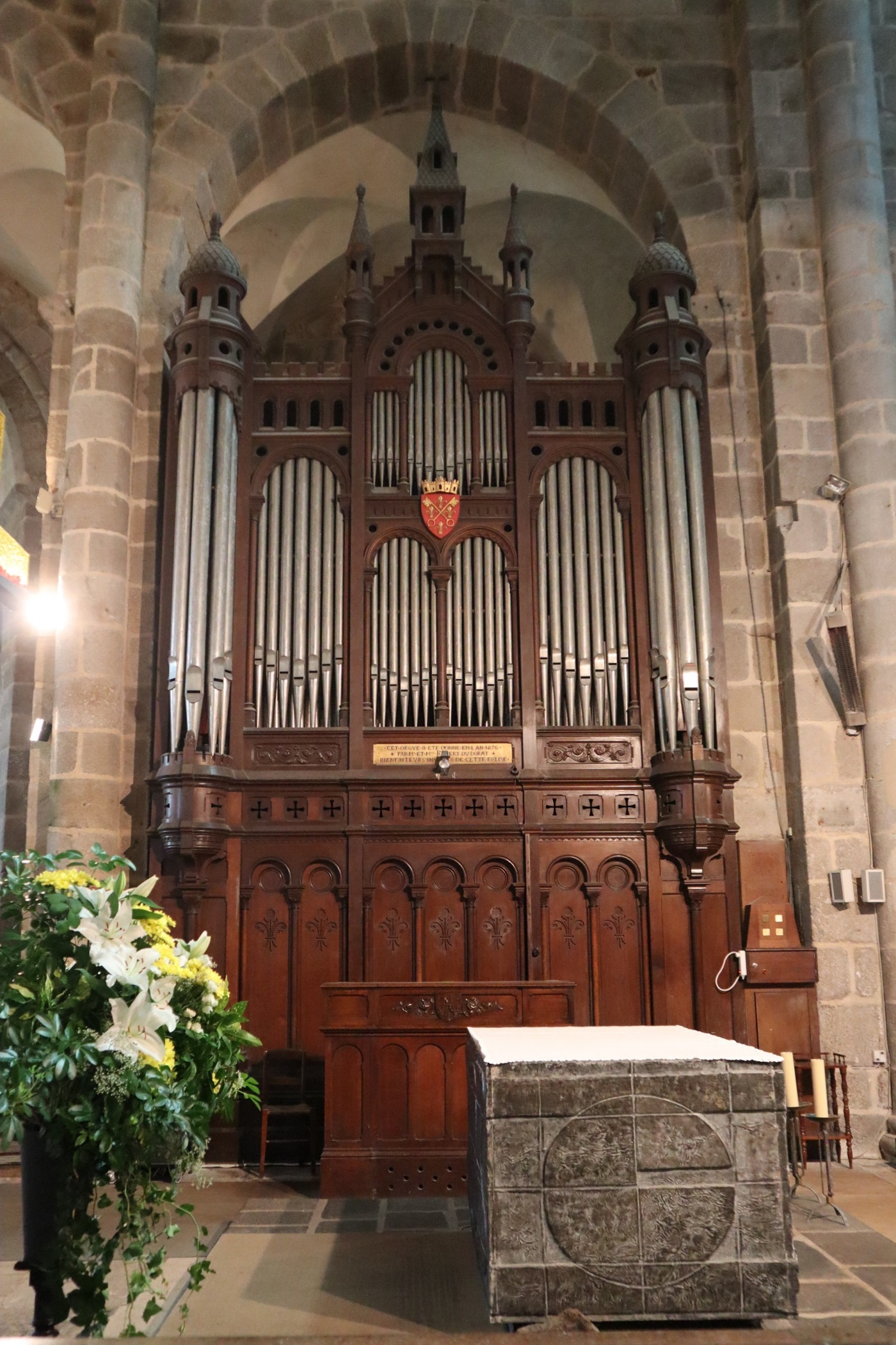 Intérieur de la collégiale Saint-Pierre du Dorat (87). Grandes-Orgues.